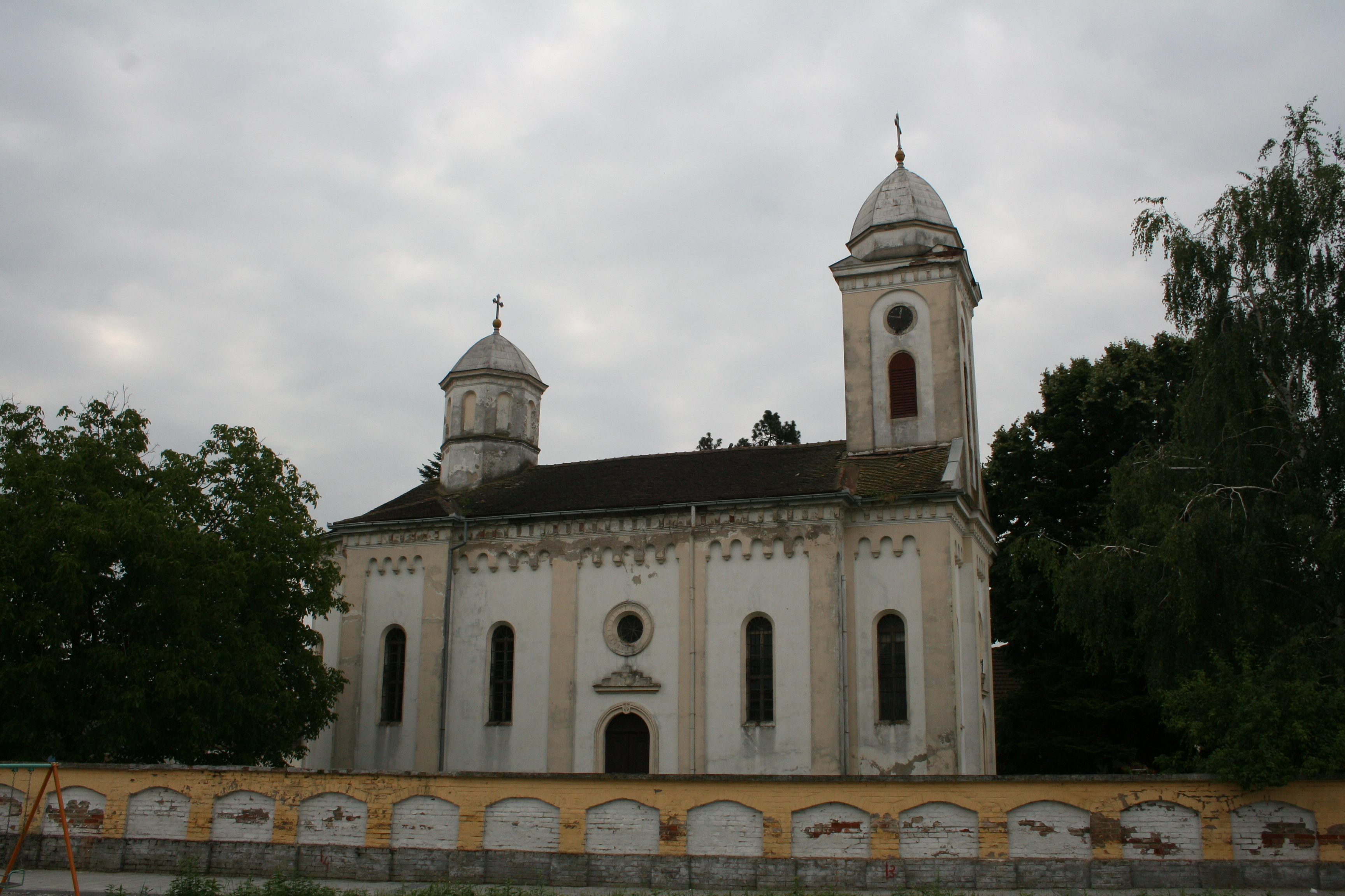 Crkva Vaznesenja Gospodnjeg, Drenovac